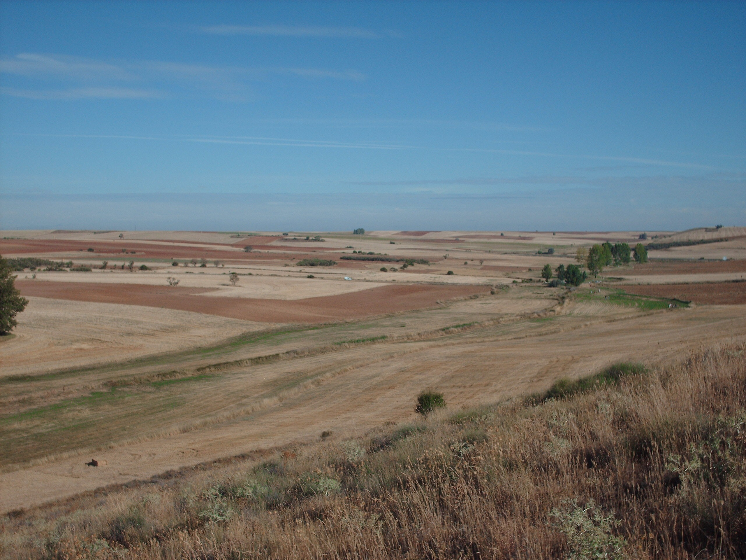 Foto del valle de Matanza de los Oteros tomada en el verano de 2010 durante el Senderismo